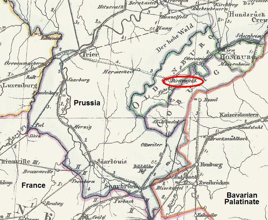 Das oldenburgische Birkenfeld 1829